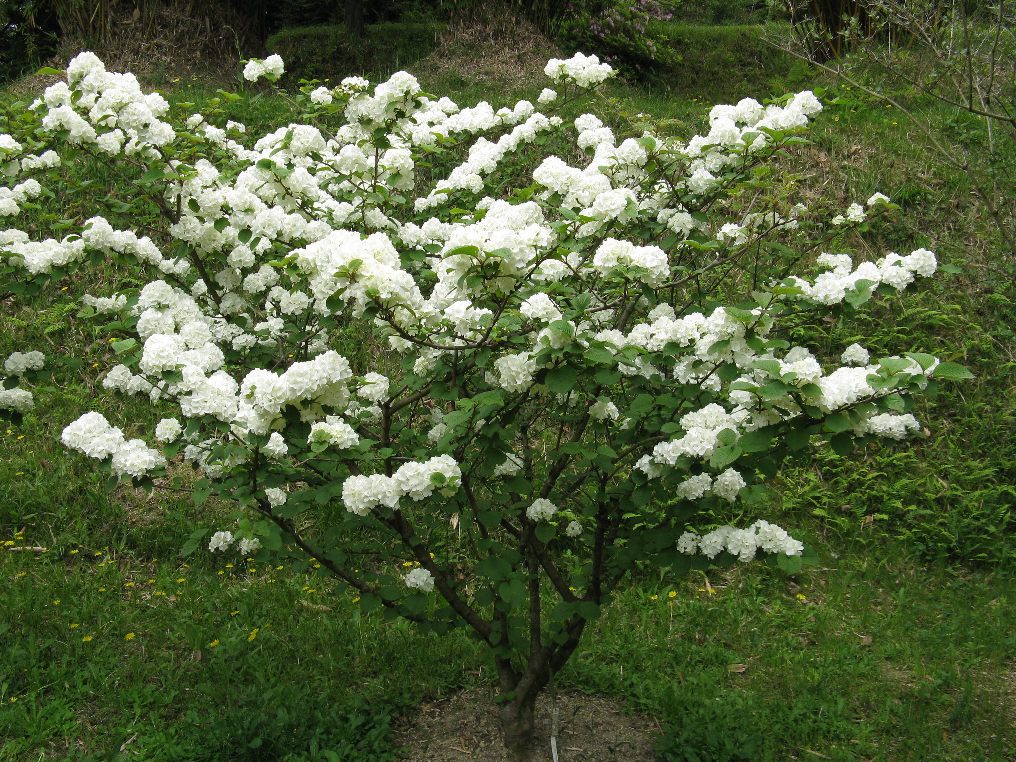 Viburnum plicatum var. plicatum